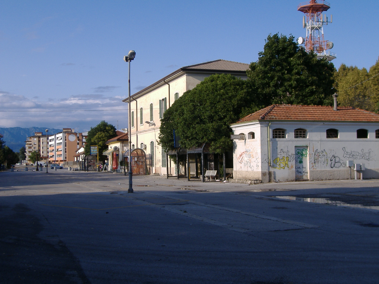 Ex stazione di Spilimbergo con banchina ancora visibile